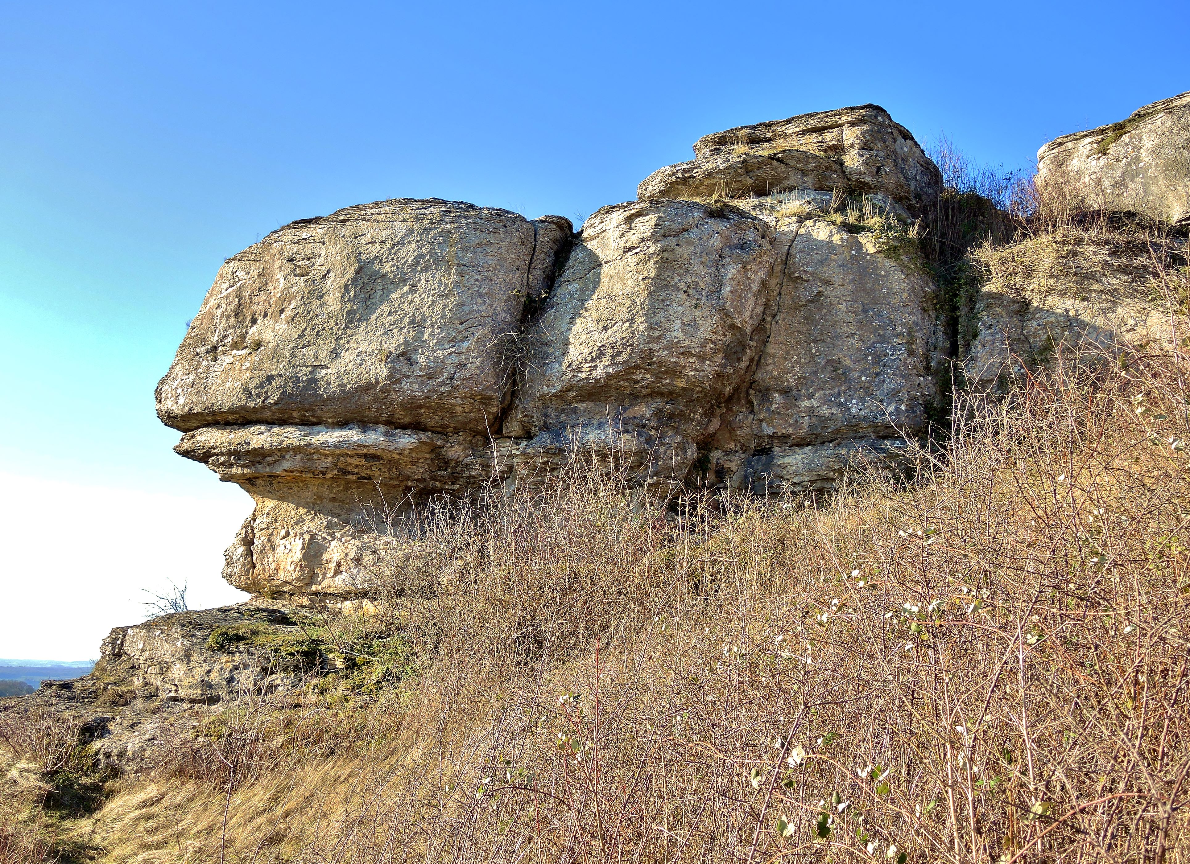 Groupe de rochers situé côté ouest du plateau nommé camp de César. Le site domine le village de Chariez, département de la Haute-Saône.